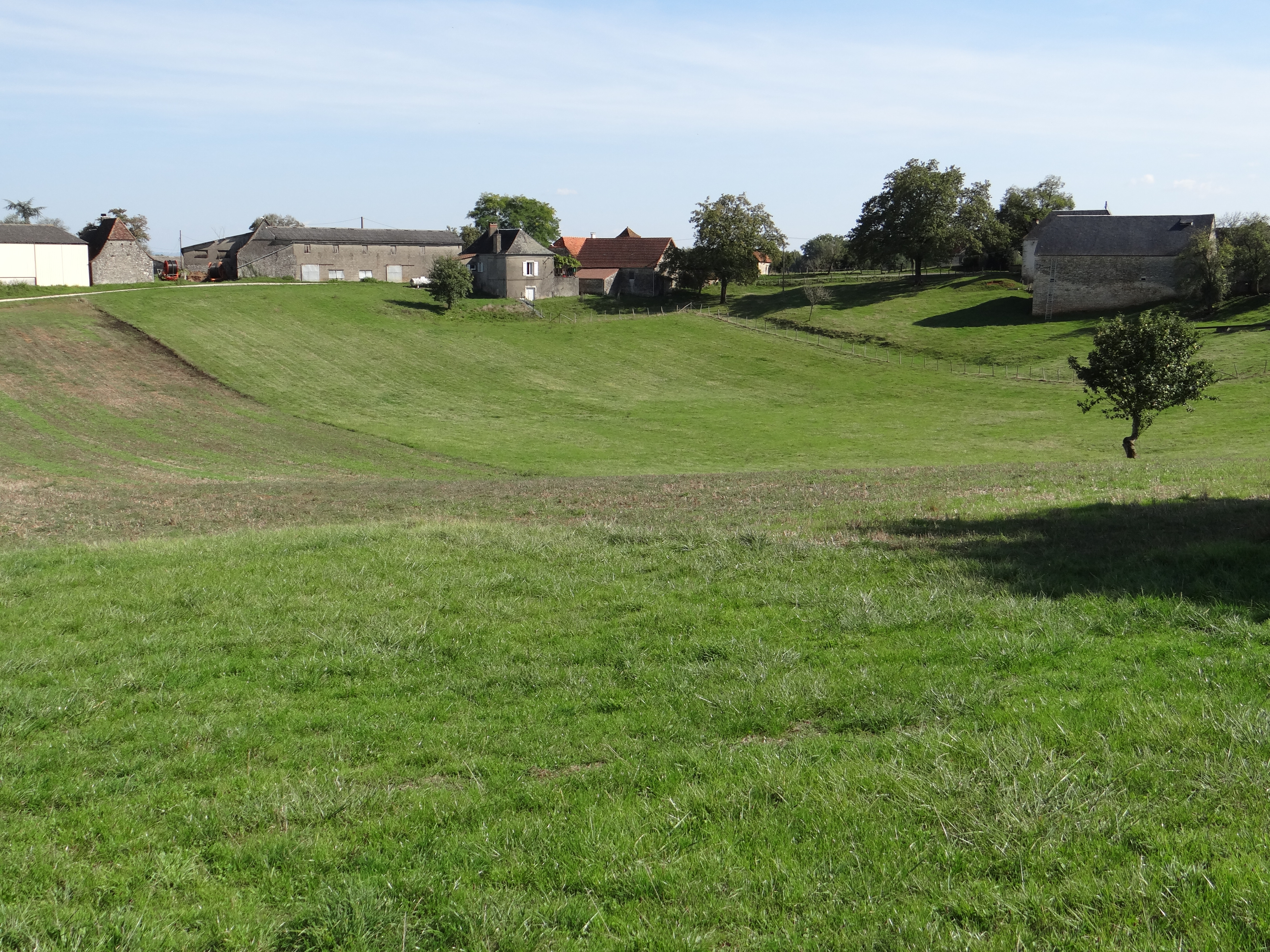 Exemple de doline sur le causse de Martel, à Mayrac (Lot, France)